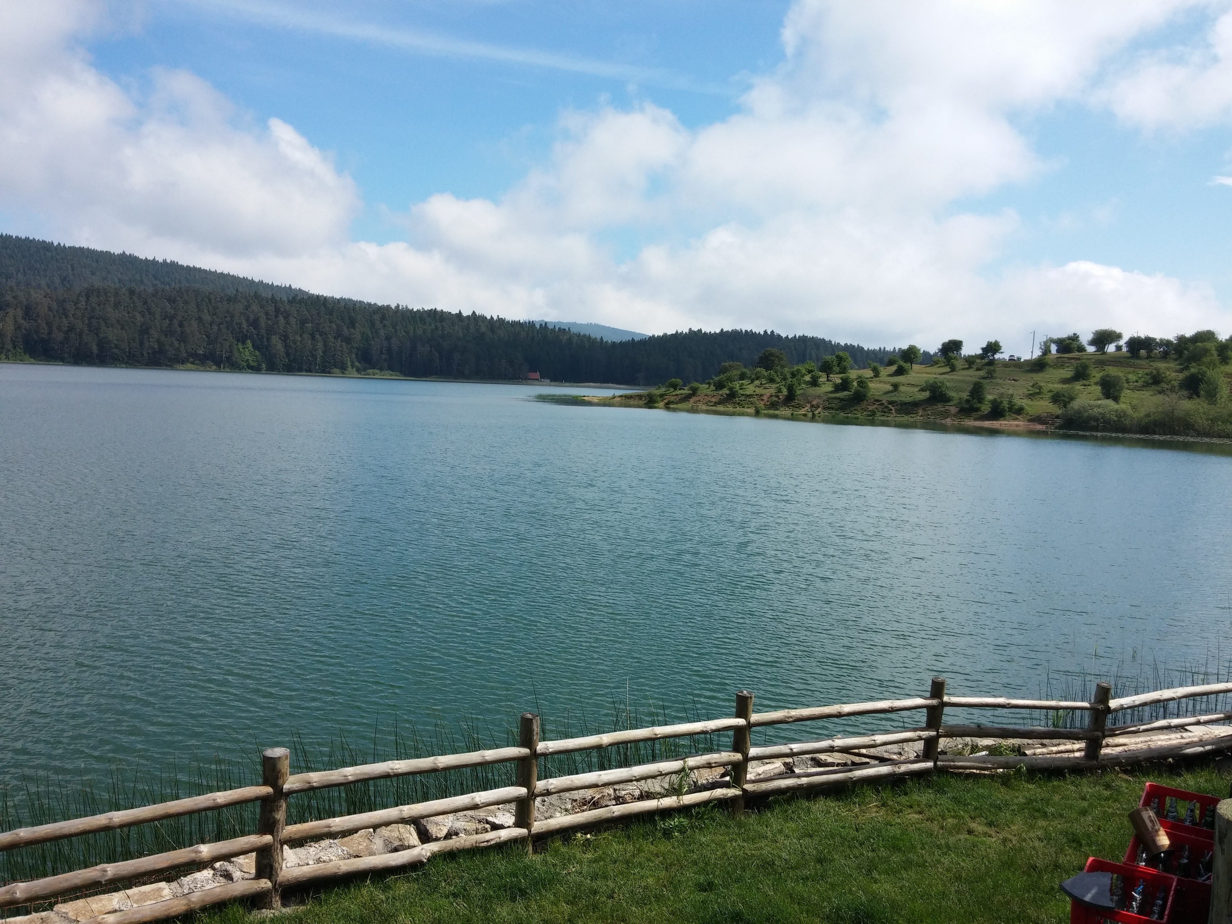 abant gölü